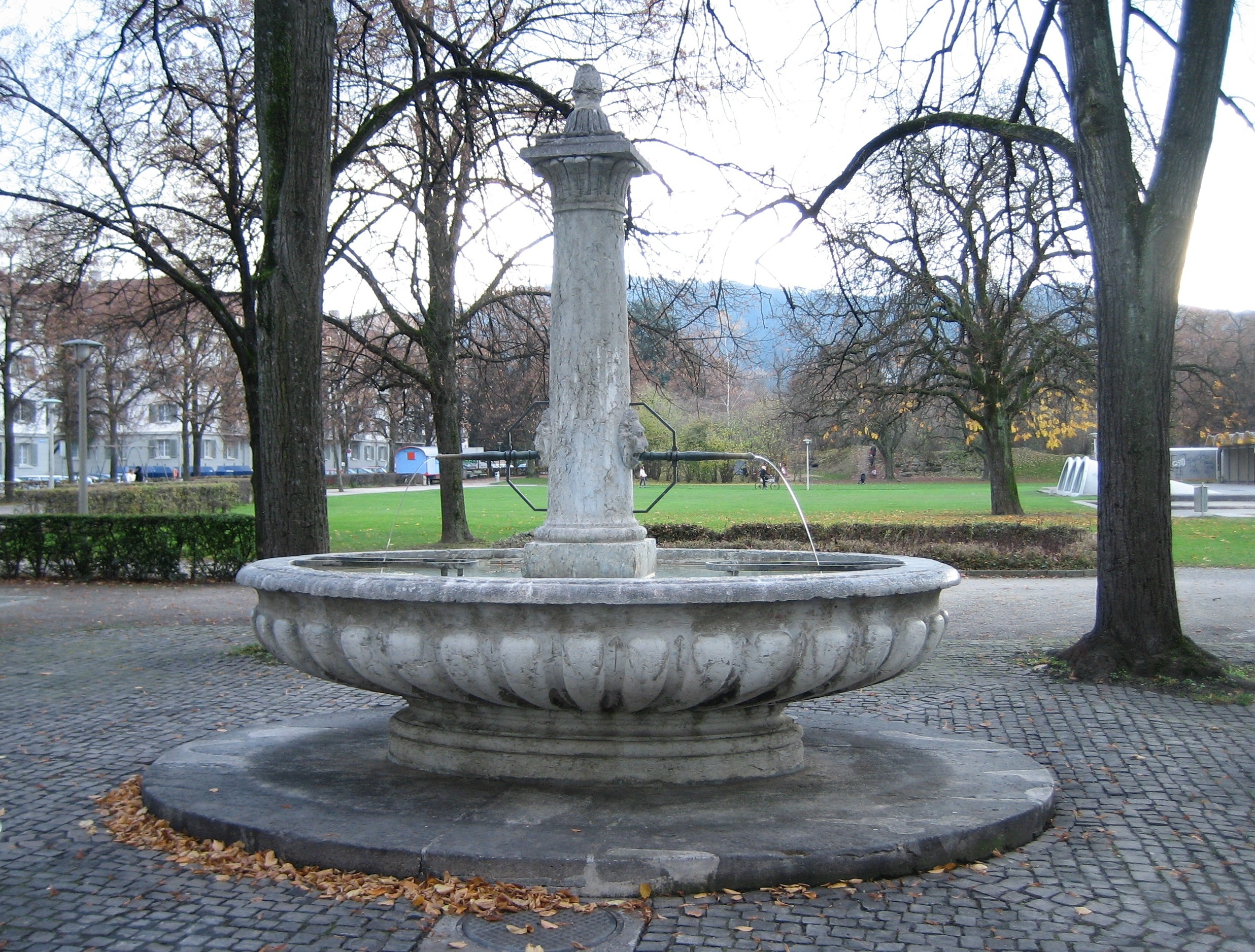 Der Brunnen aus dem ehemaligen Kratzquartier in Zürich, heute an der Fritschiwiese